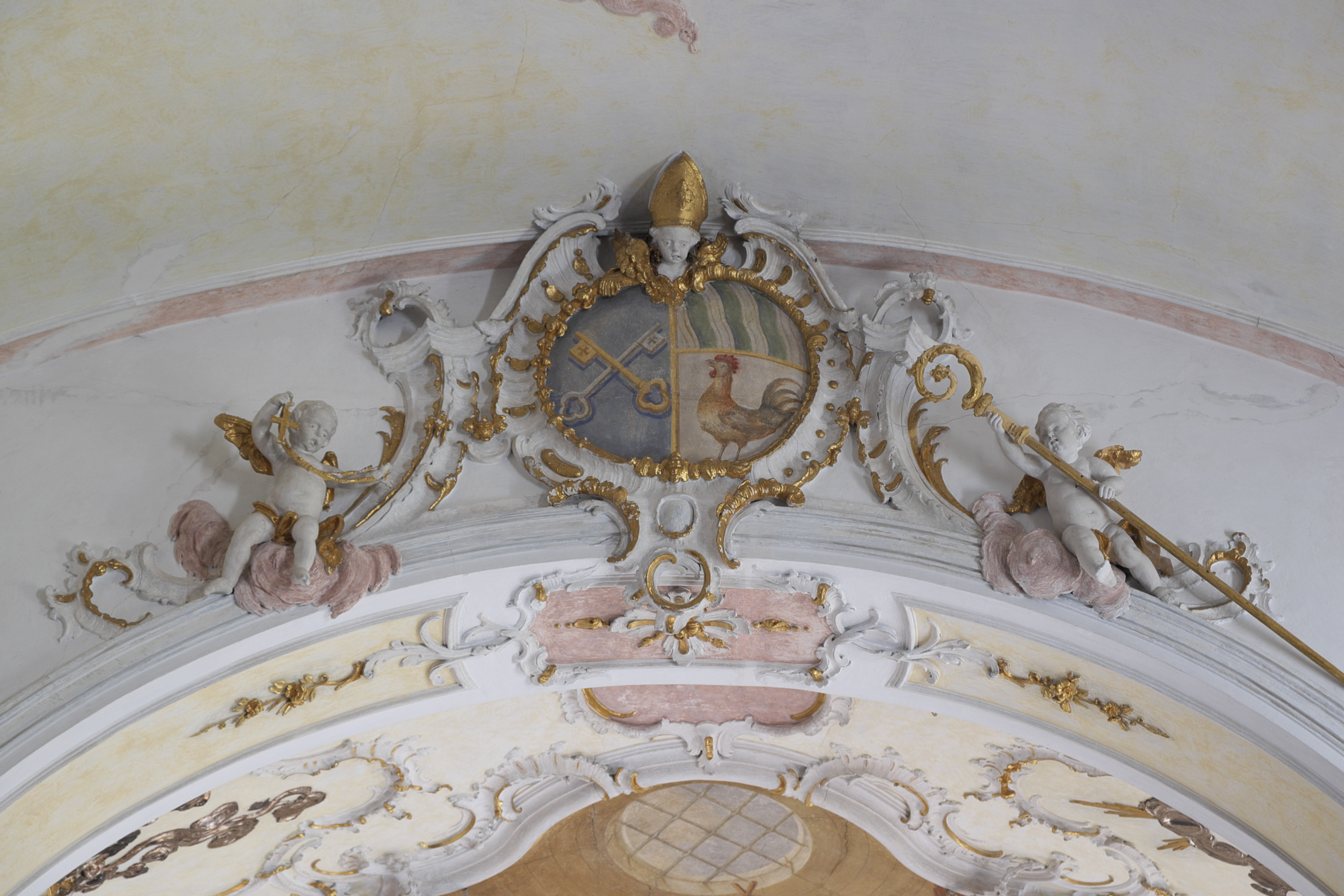 Katholische Pfarrkirche St. Johannes der Täufer in Rott im Landkreis Landsberg am Lech (Bayern/Deutschland), Stuck vermutlich von Johann Michael Merk, Wappen des Wessobrunner Abtes Engelbert Goggl am Chorbogen